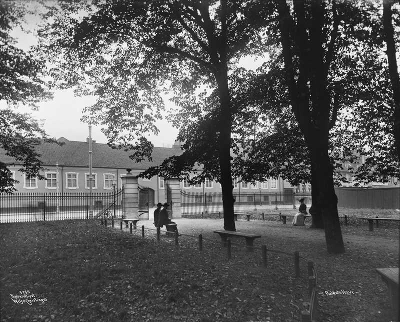 Paléet og Paléhaven i 1905.